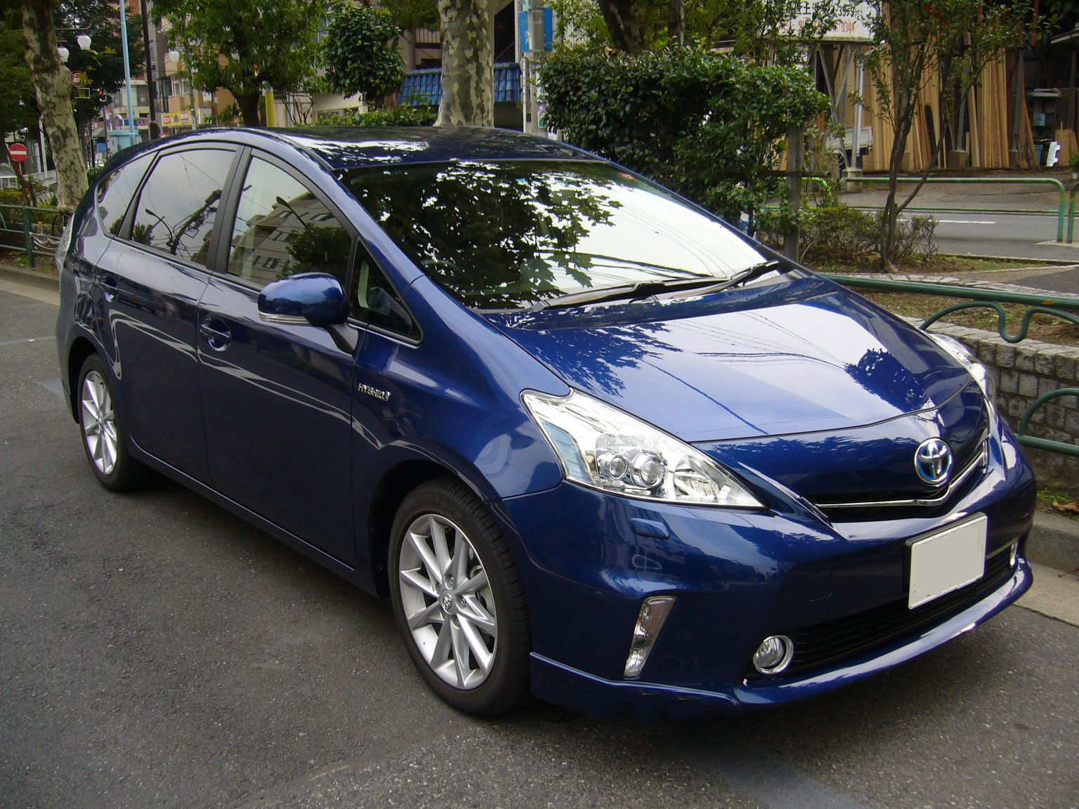 トヨタ・プリウスα